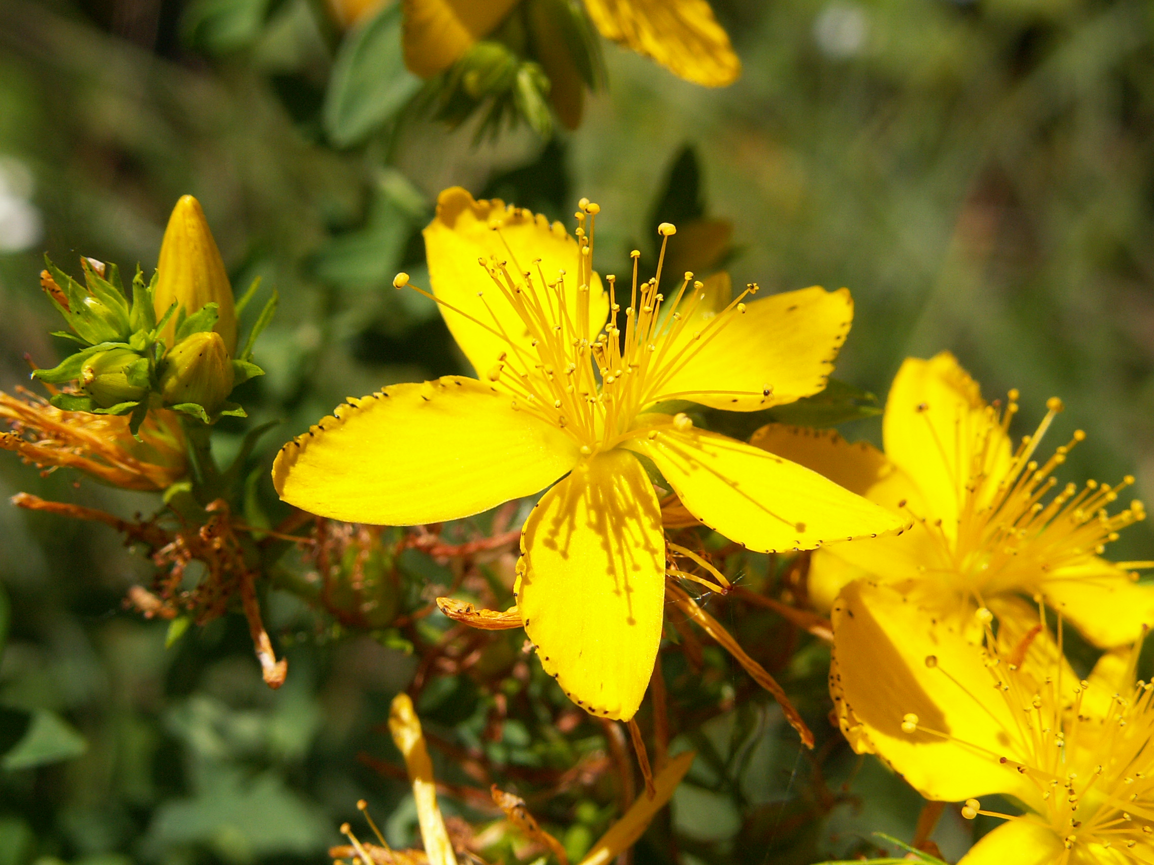 セイヨウオトギリ（セントジョンズワート）Hypericum perforatum. Эрзянь: Нумолонь верень цецят.